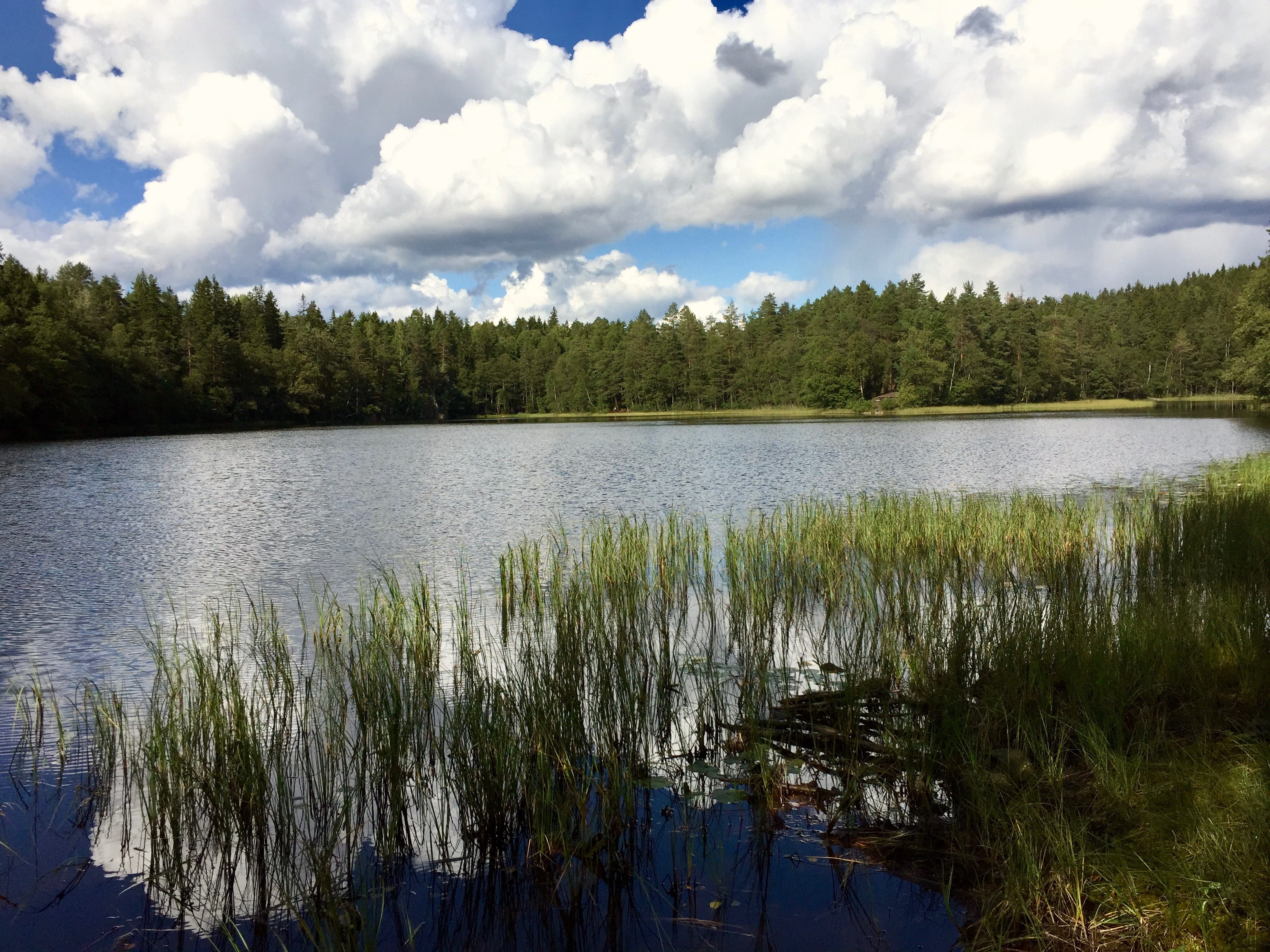 Kroktjern i Østmarka i Oslo, sett fra sørenden.